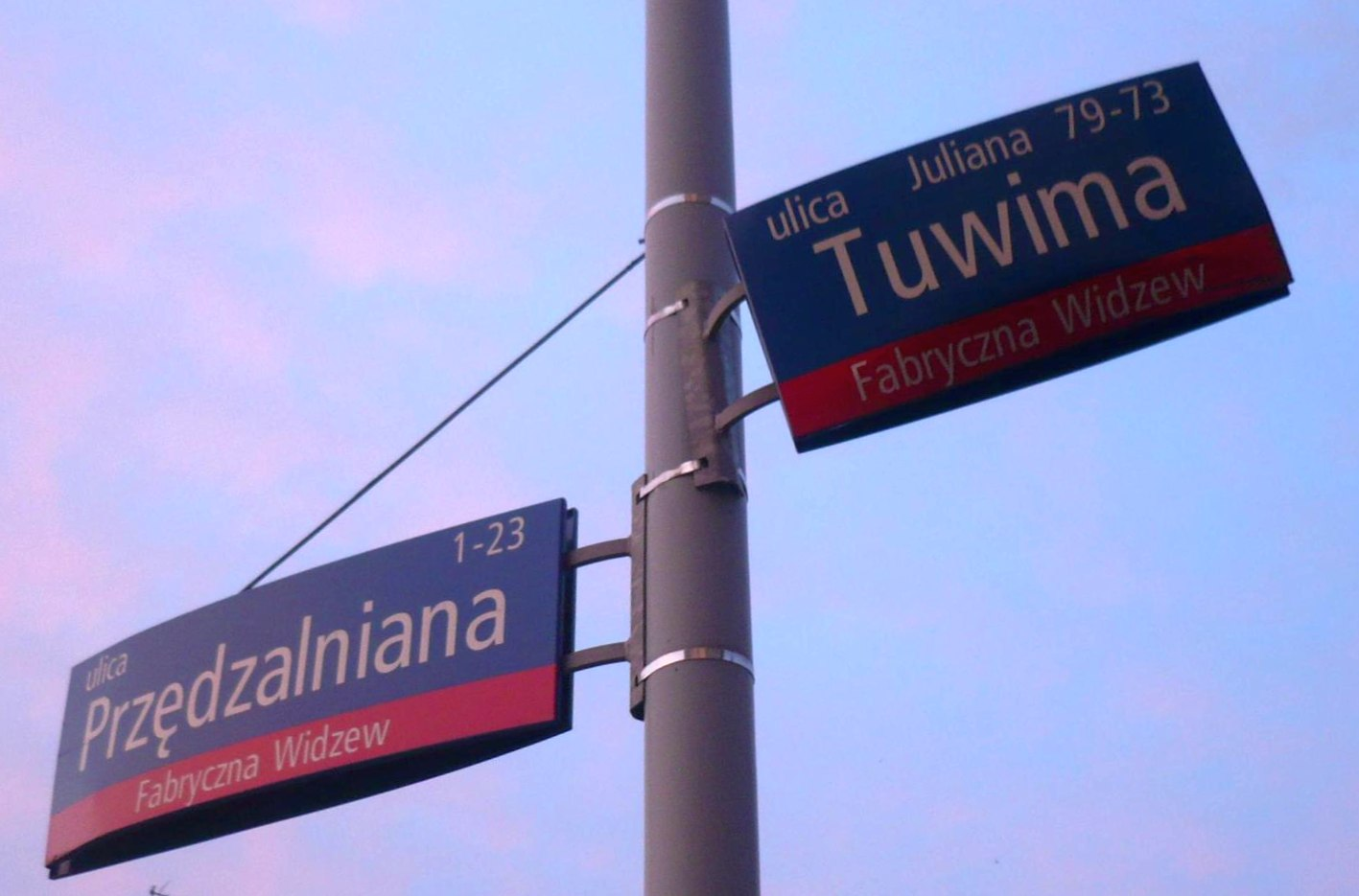 Przykład zniszczonego oznakowania tablicami ulicowymi, które umieszczono na istniejącym słupie energetycznym